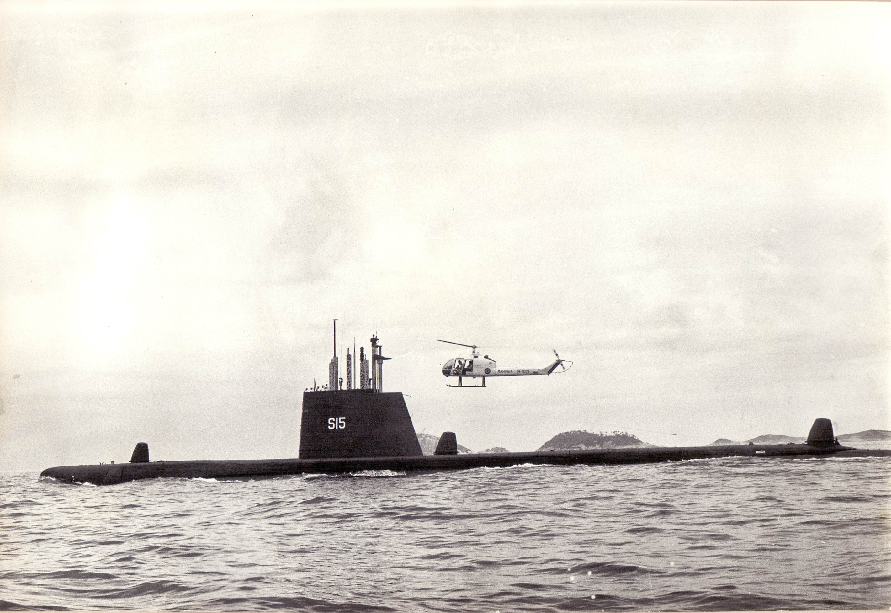 Arquivo liberado pela Marinha do Brasil através de projeto GLAM com Wiki Educação Brasil